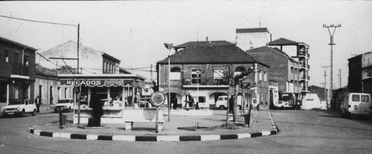 Plaza - Laguna de Duero (Valladolid) - Fotografía 116 x 50 B/N